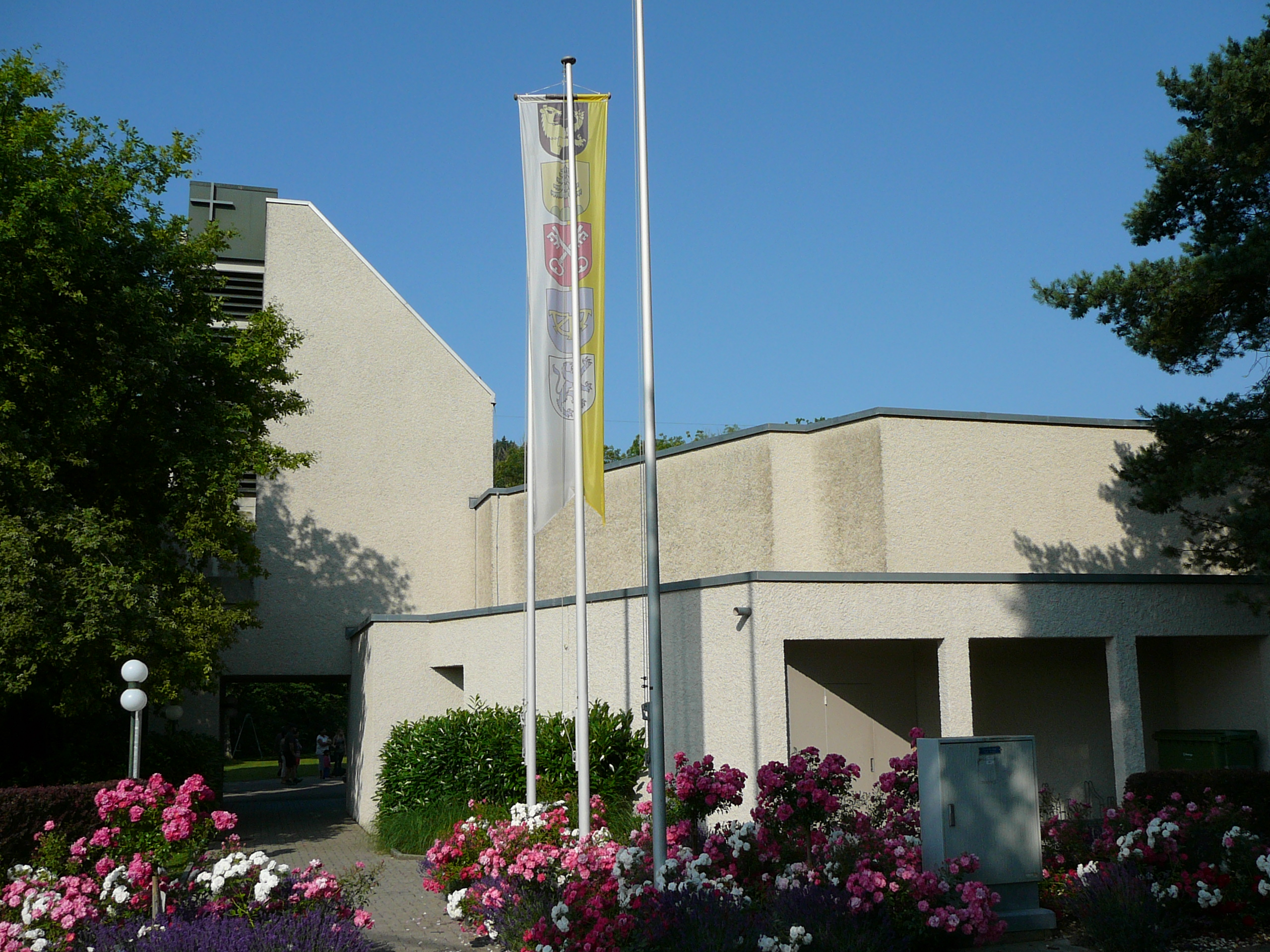 Römisch-katholisches Pfarreizentrum St. Petrus Embrach